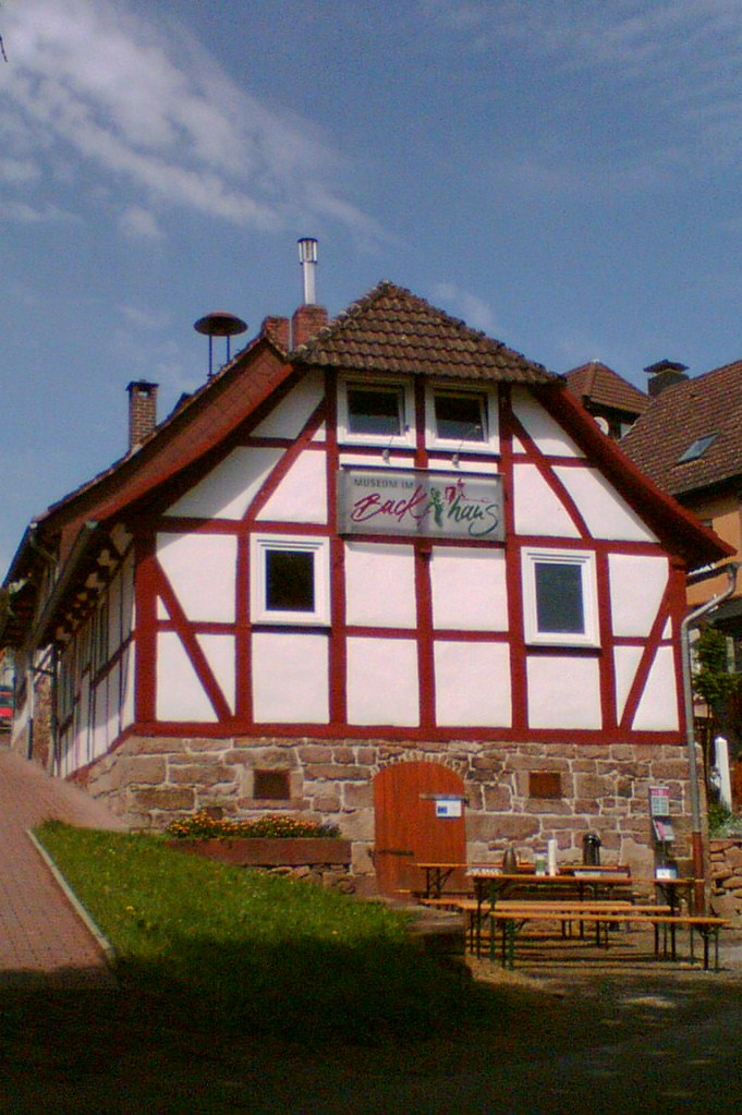 Das Museum im Backhaus in dem Dorf Hellental in Niedersachsen